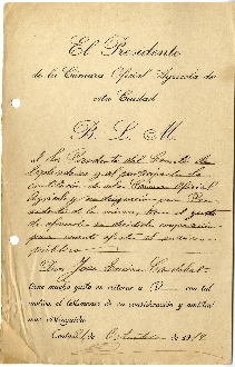 Acta de la Cámara de Comercio